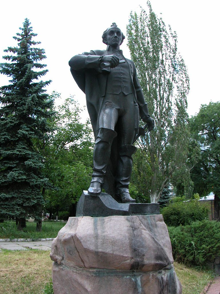 Памятник Александру Васильевичу Суворову в Симферополе